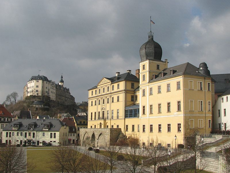 Greiz Schlösser Unteres und Oberes Schloss oberhalb der Weißen Elster Foto 2009 Wolfgang Pehlemann Wiesbaden IMG_0796